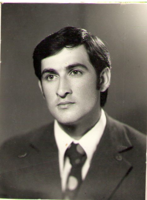 1975 год